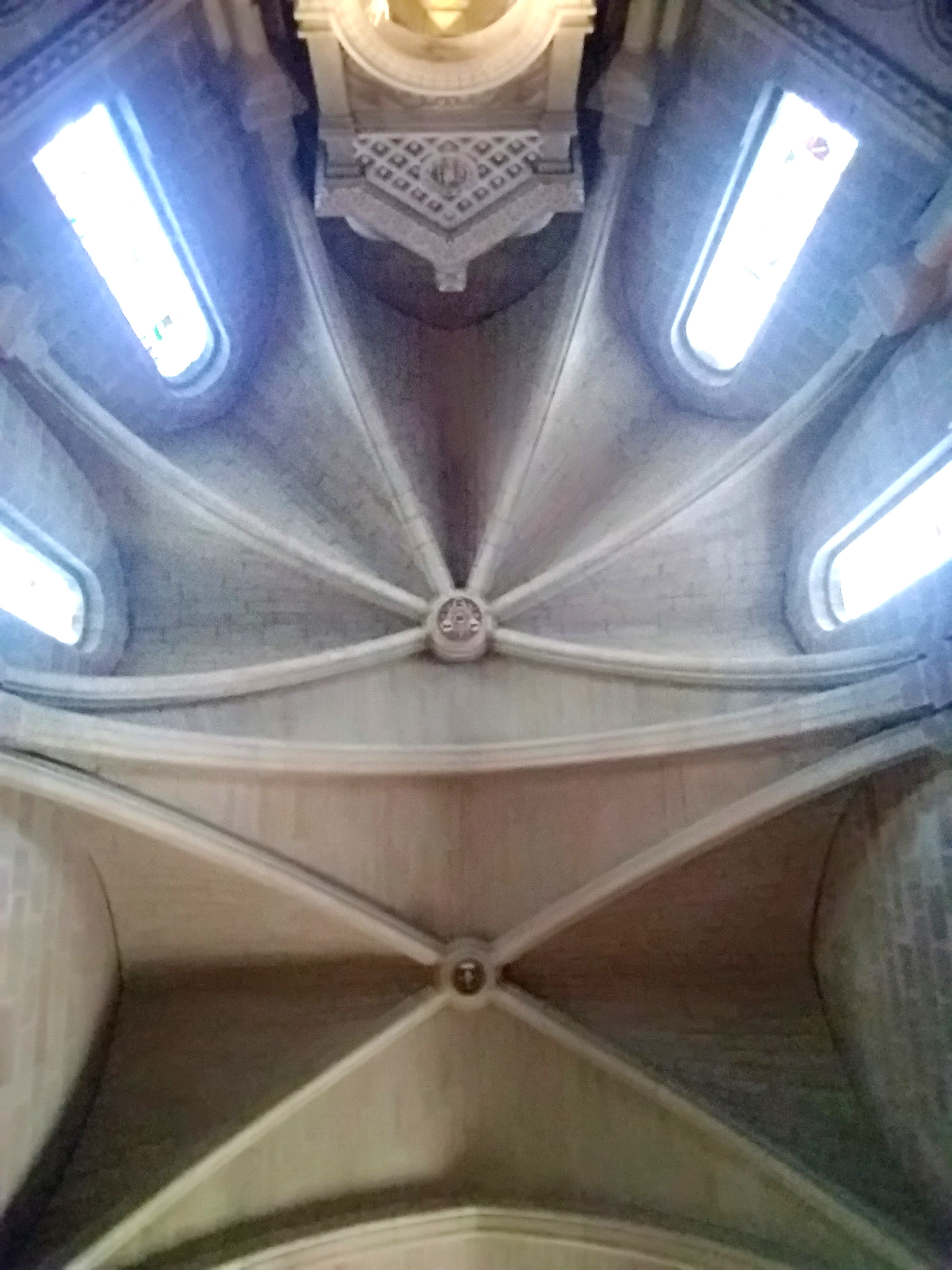 Basílica de Javier - Bóveda